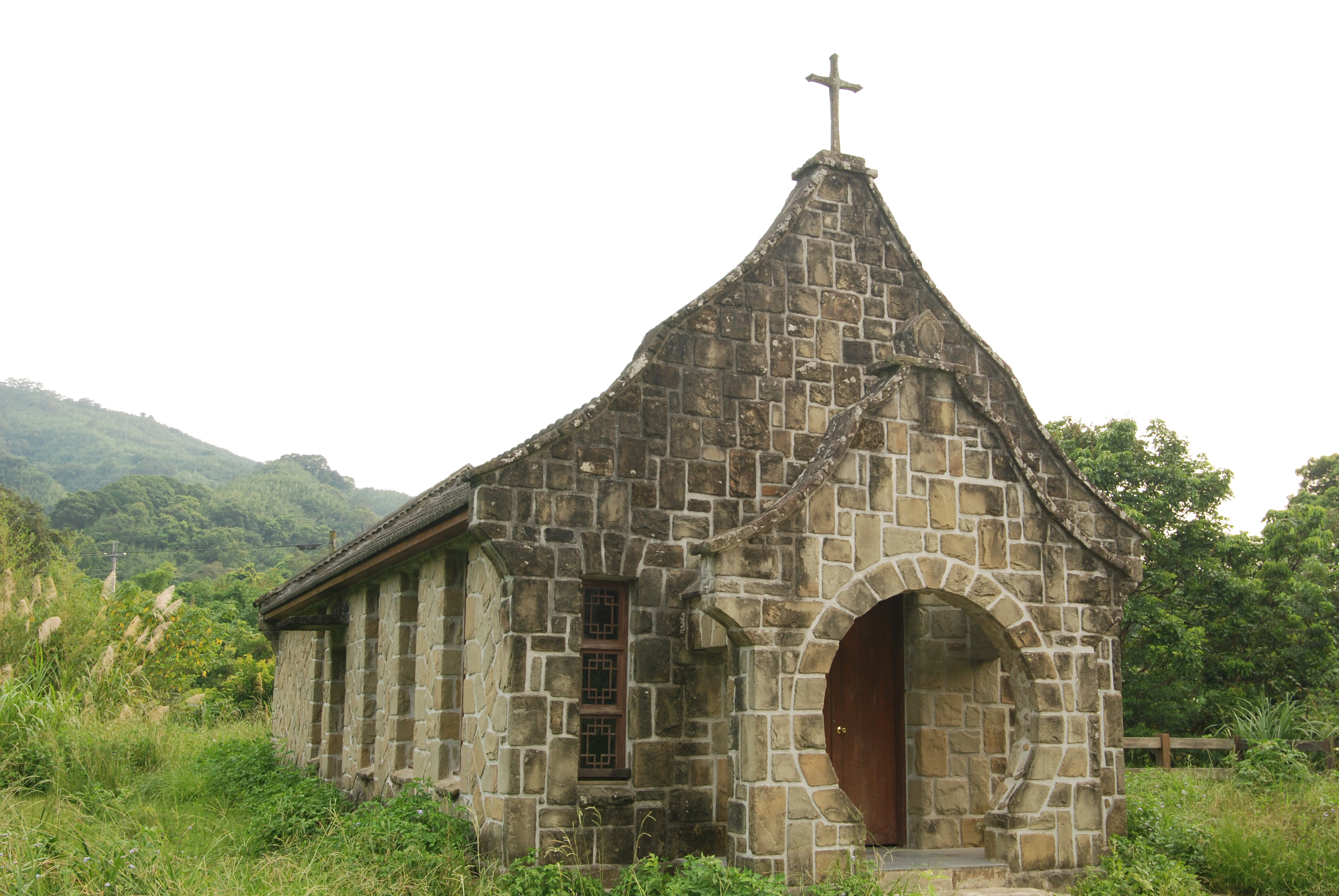 桃園縣復興鄉三民村基國派老教堂